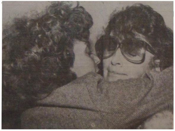 Fanny Mikey despidiendo a Feliza Bursztyn en el Aeropuerto Eldorado, cuando salió del país para exiliarse en México. Agosto 8 de 1981.